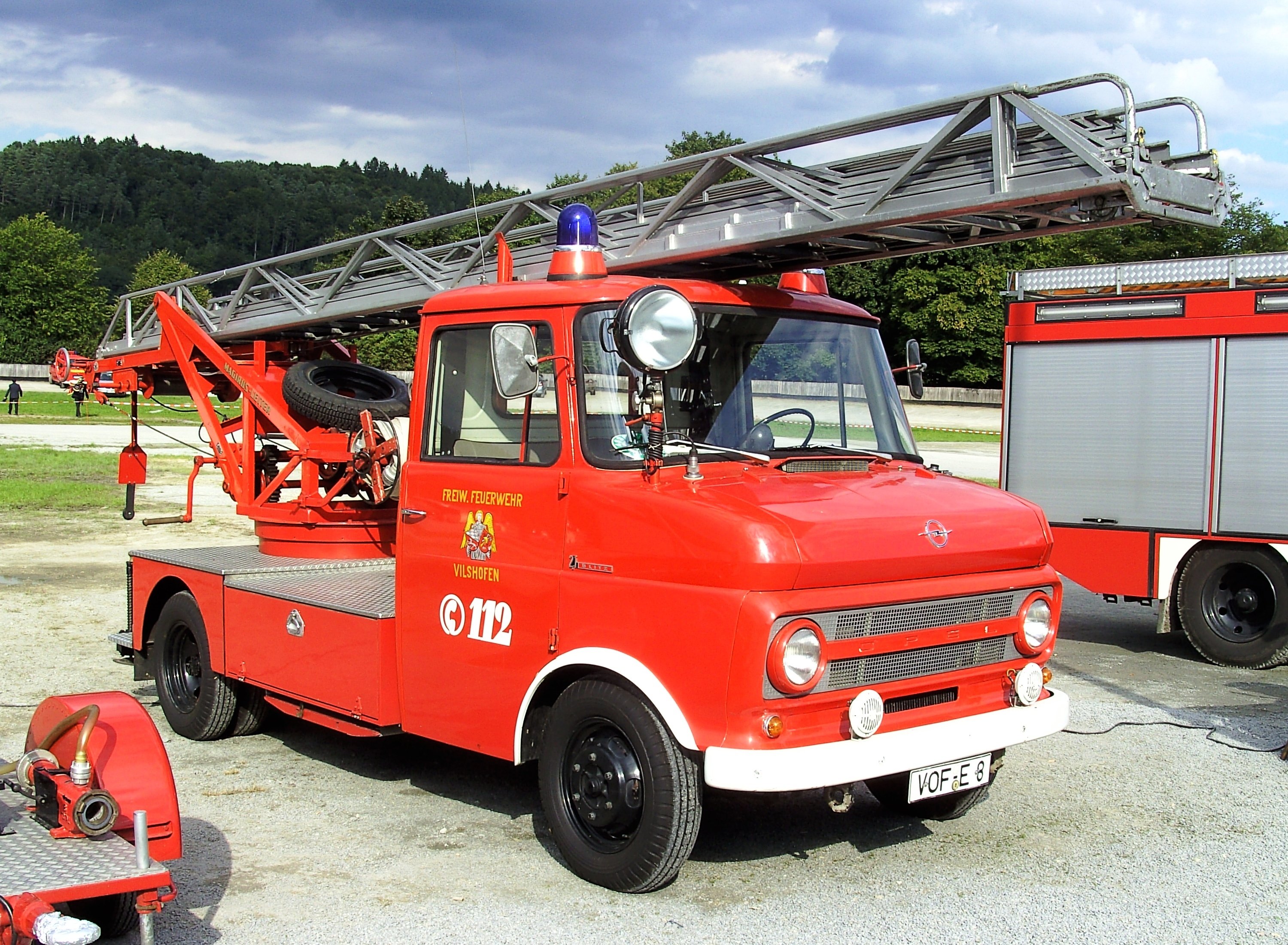 Ein Drehleiter-Feuerwehrfahrzeug auf Opel-Blitz-Chassis, das nach wie vor im Dienste der FFW Vilshofen an der Donau steht.